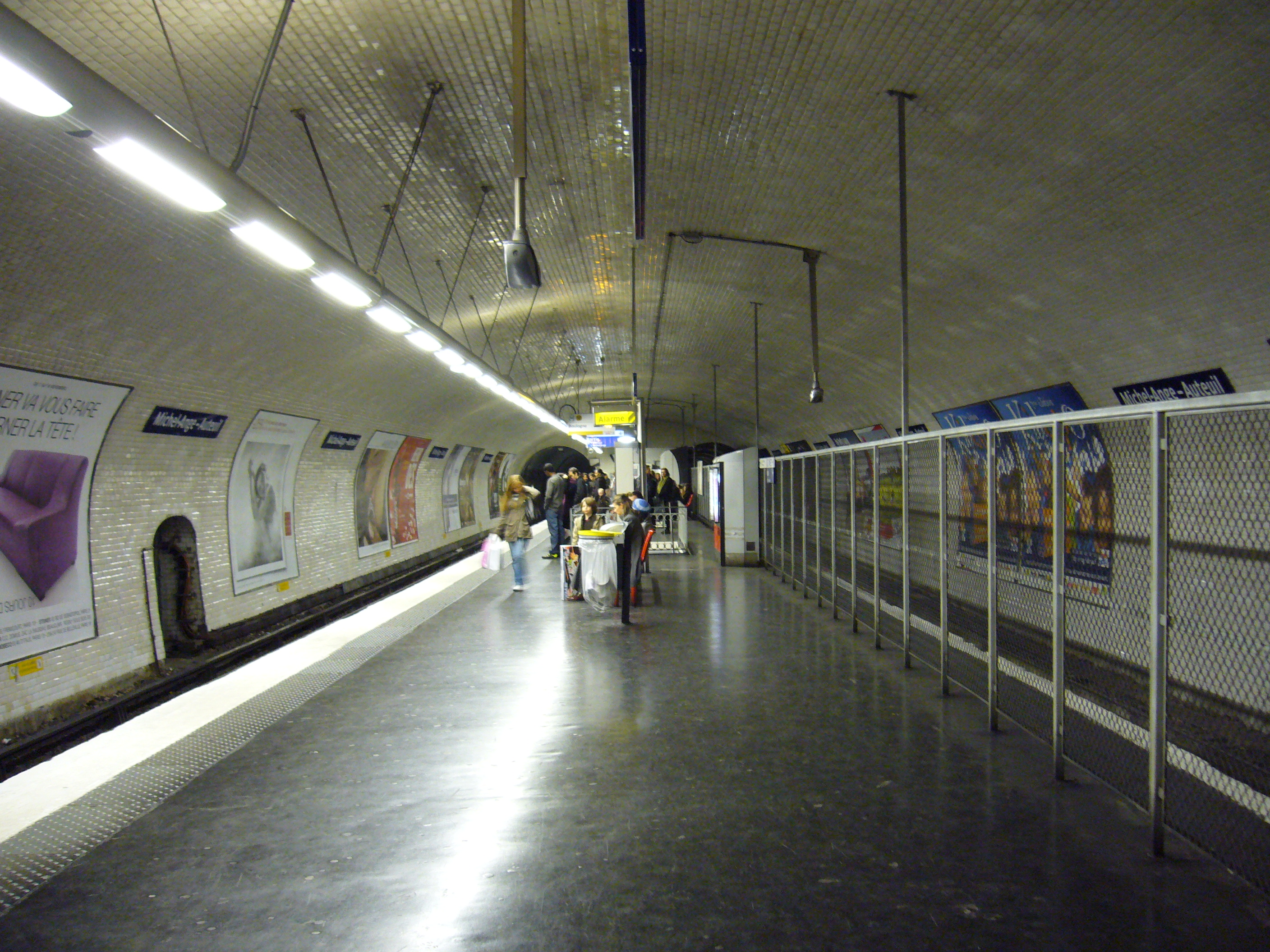 Les quais de la station Michel-Ange - Auteil sur la ligne 10 du métro de Paris.